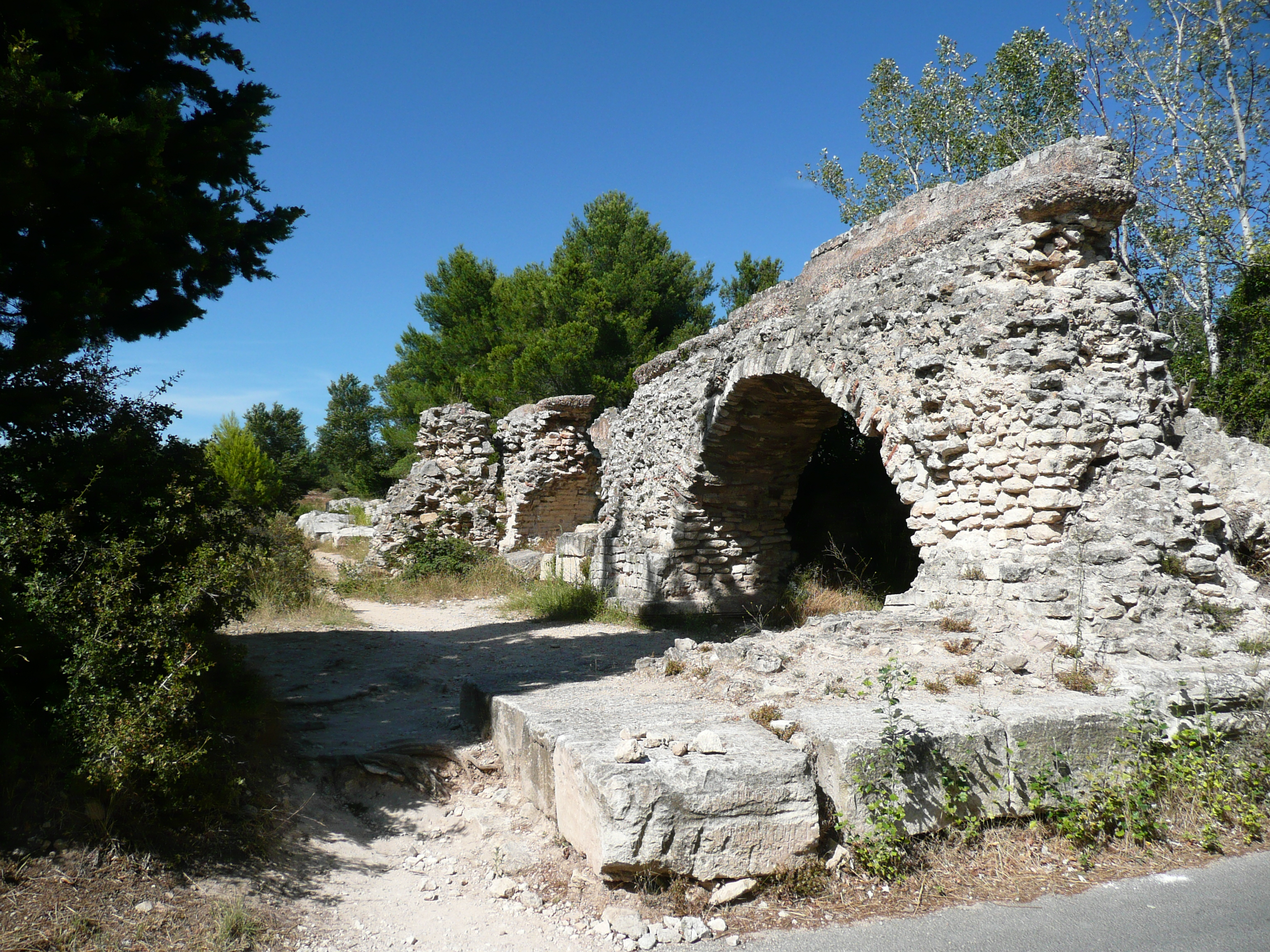 Barbegal aqueduct